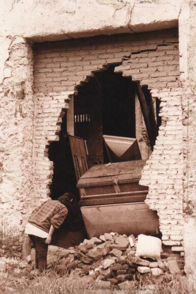 Detalle de la troje de la Hacienda de San Nicolás Tolentino, en Iztapalapa, México. Se trata de un monumento histórico catalogado por el Instituto Nacional de Antropología e Historia (INAH) de México. El edificio funcionó como crematorio del panteón civil de San Lorenzo Tezonco hasta que su avanzado deterioro llevaron a abandonarlo. En la fotografía, una adolescente se asoma al interior. Por el resquicio se alcanzan a advertir los restos de algunos ataúdes abandonados. Fotografía tomada en 1999 por Carlos Soto.